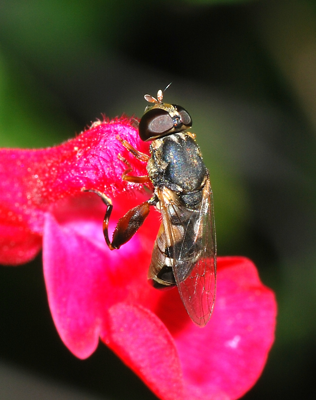 Hoverfly (Syritta pipiens)